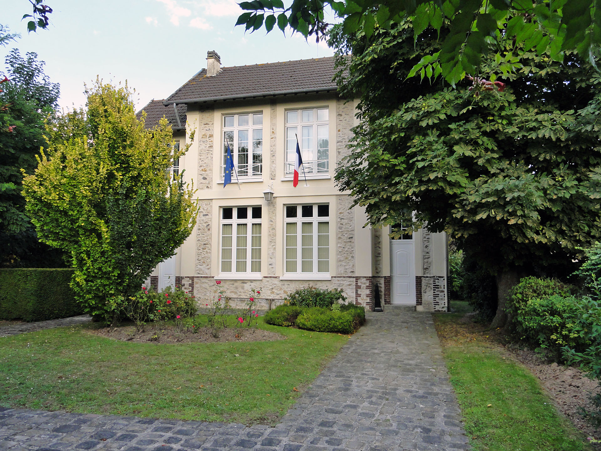 La mairie du Plessis-Gassot, Val-d'Oise, France.